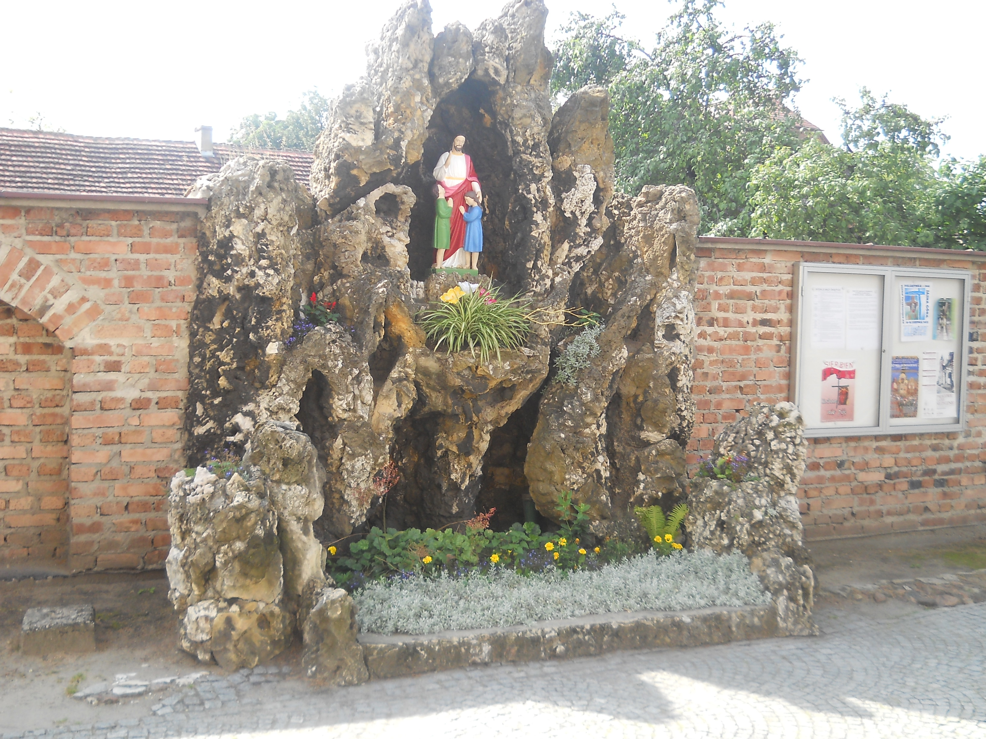 kościół par. p.w. św. Mikołaja - grota przykościelna Pyskowice, ul. Poniatowskiego